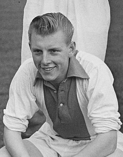 Arend van der Wel.